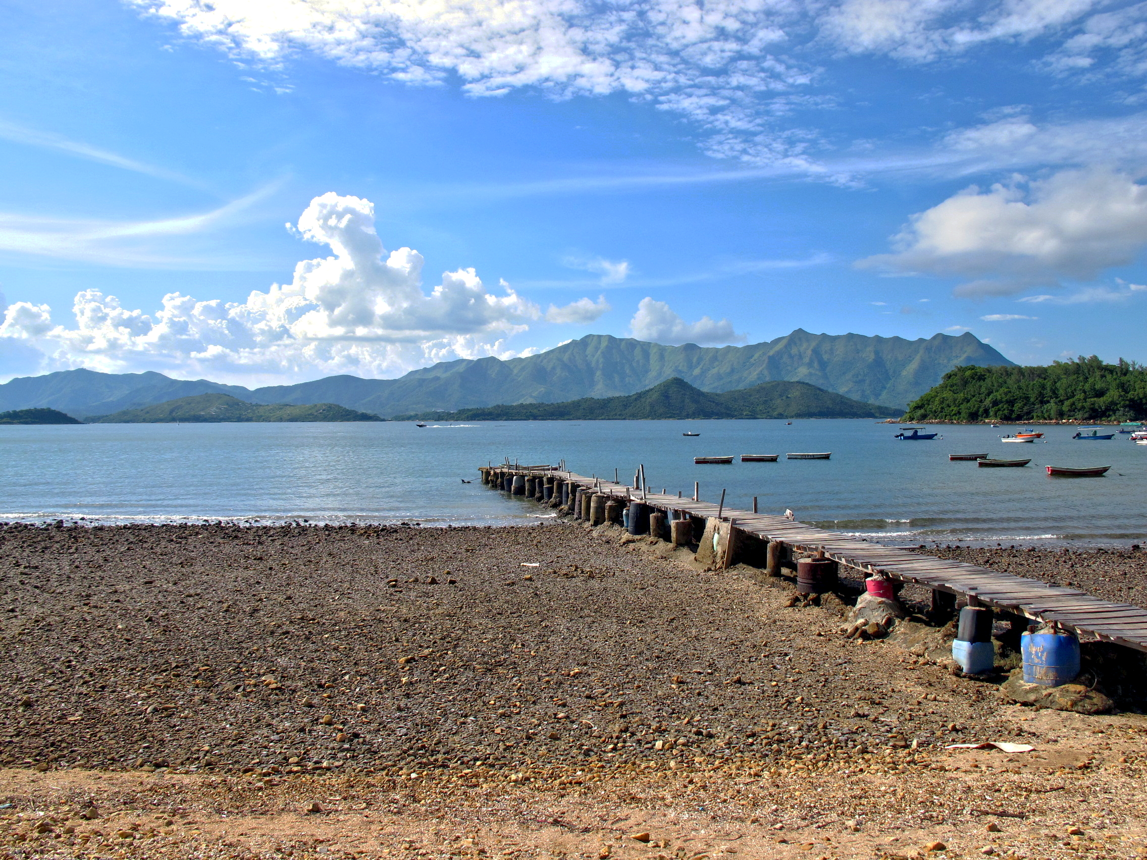 Wu Kai Sha Abanded Pier